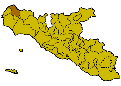 Locatie van Santa Margherita di Belice